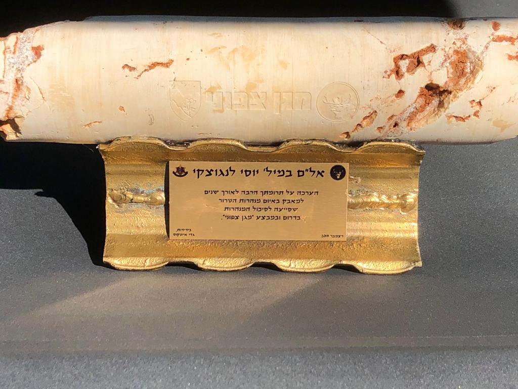 תעודת הערכה מרא"ל (במיל') גדי אייזנקוט לתרומתו של יוסי לנגוצקי בניסיון לפתור את בעיית המנהרות בצפון ובדרום